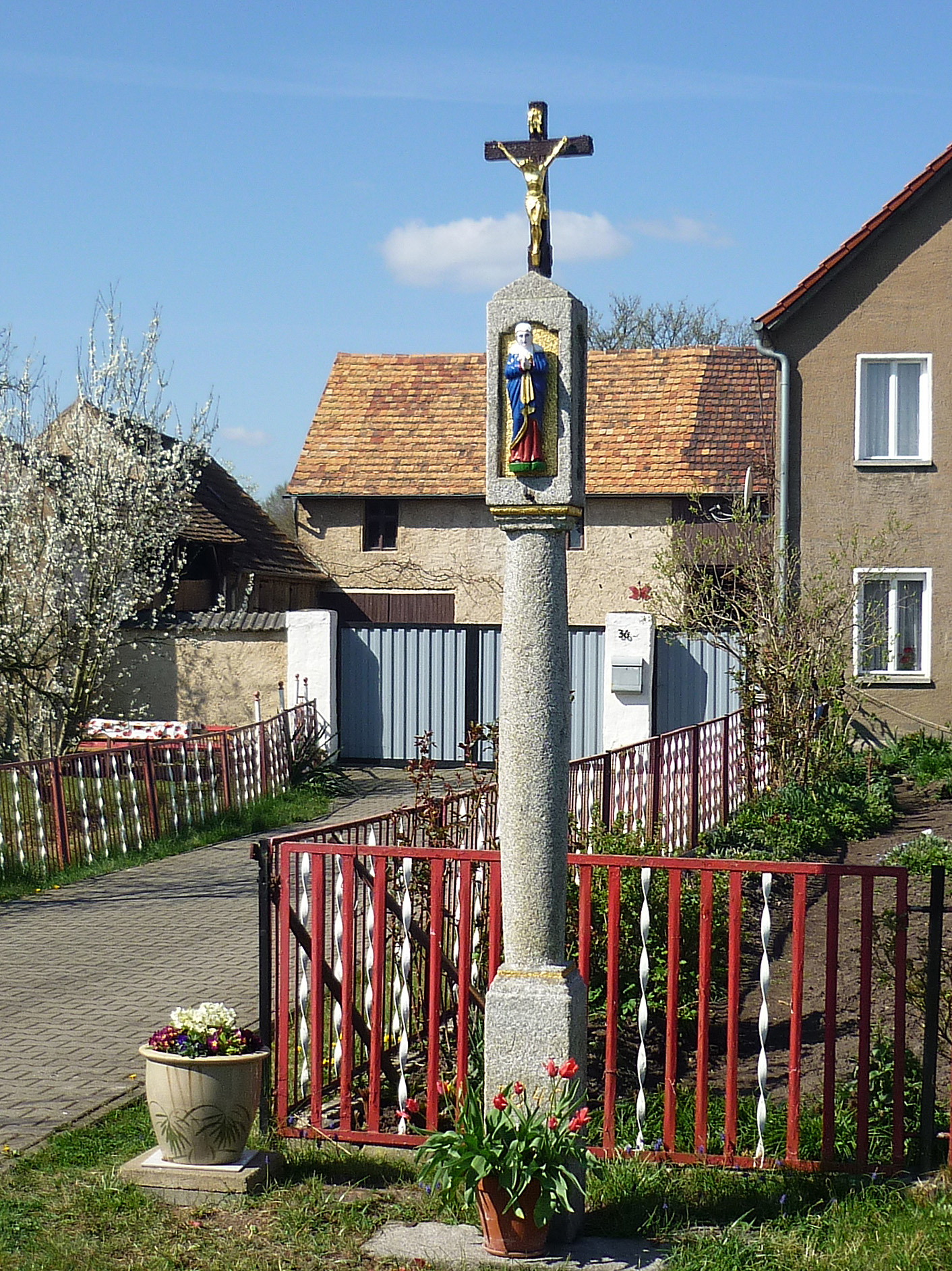 Bildstock in Saalau Nr. 36 Hornjoserbsce: Modlerski stołp w Salowje, čo. 36